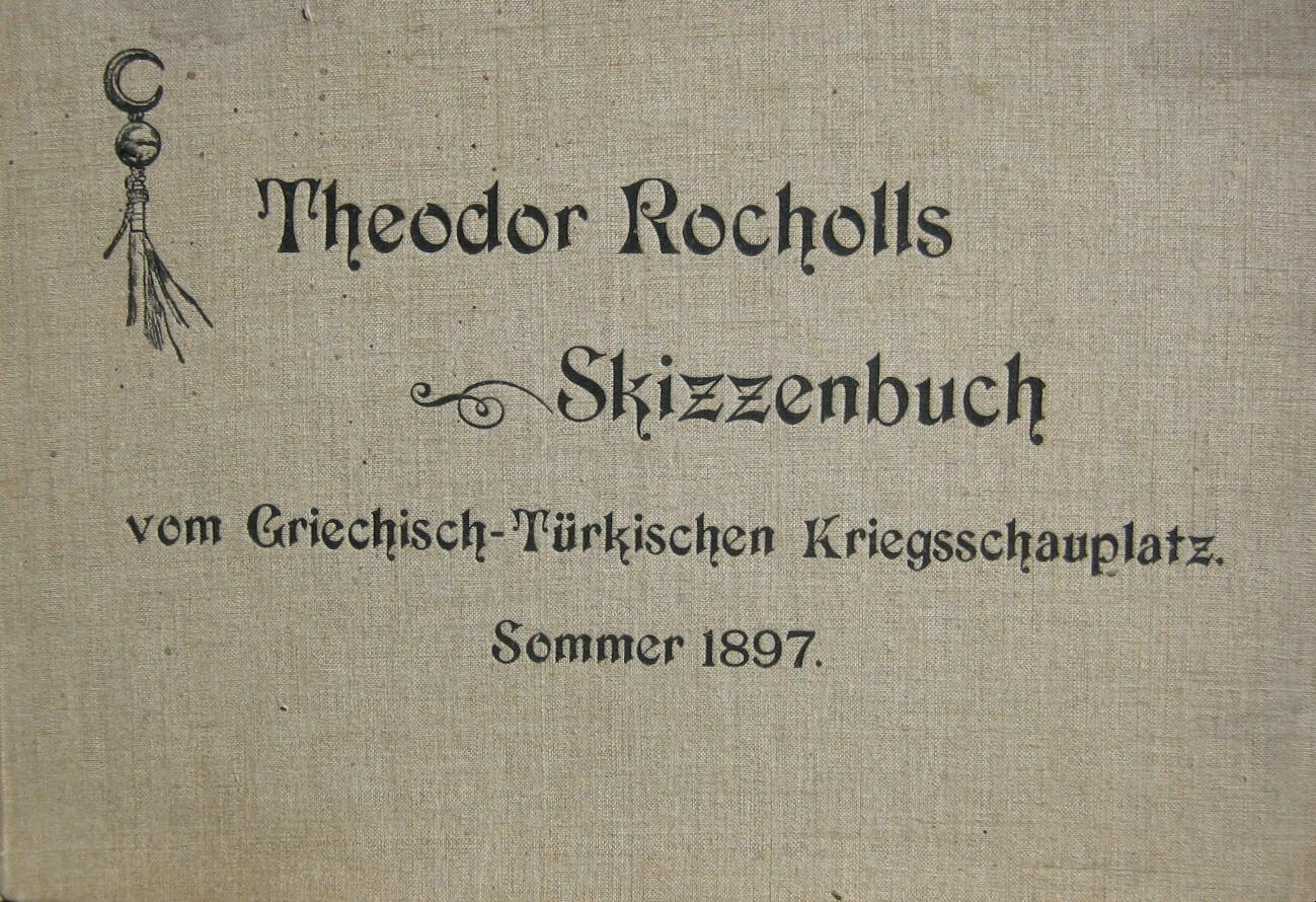 Theodor Rocholls Skizzenbuch - vom Grichisch-Türkischen Kriegsschauplatz - Sommer 1897